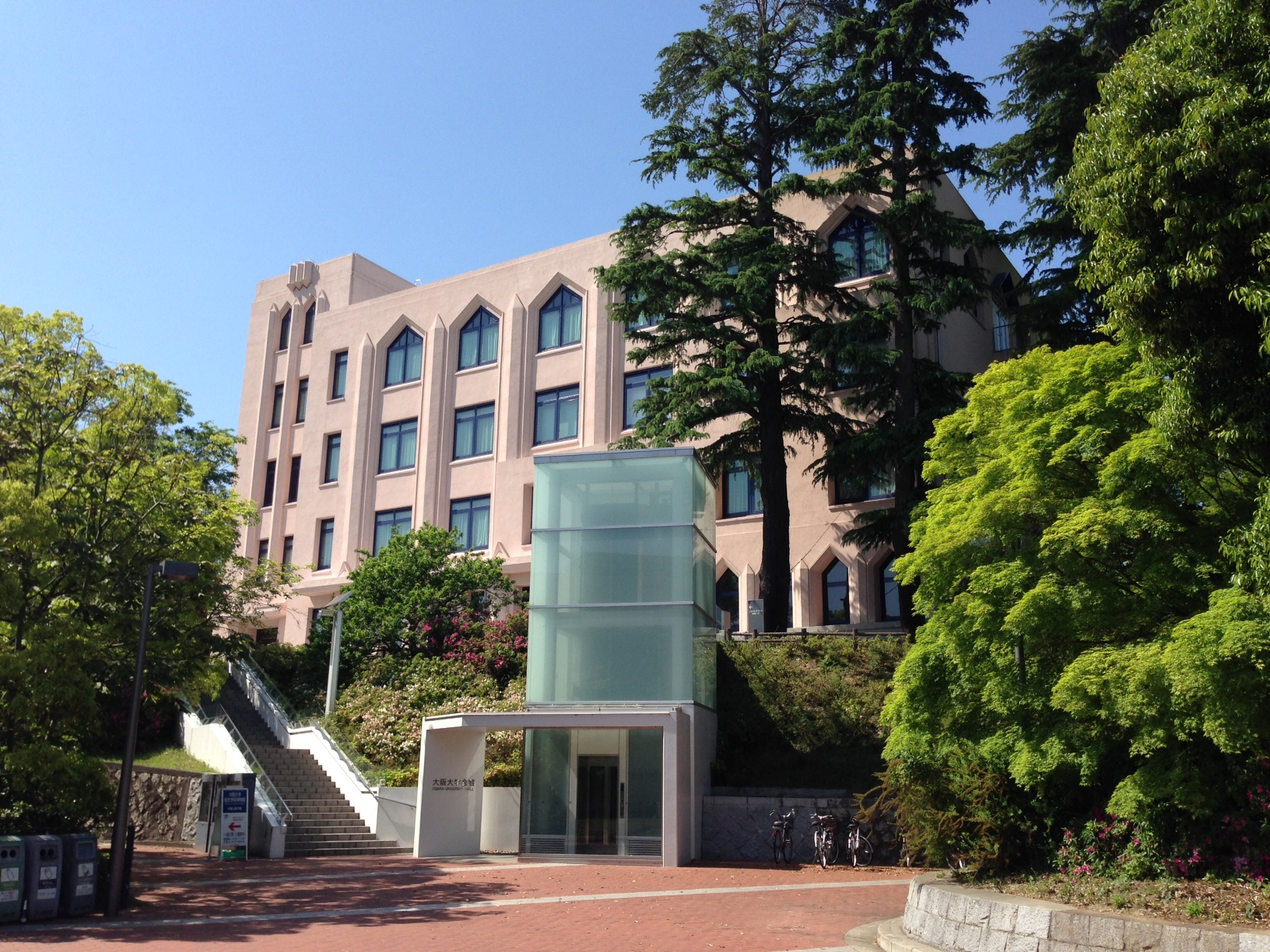 大阪大学会館（旧名称：イ号館）